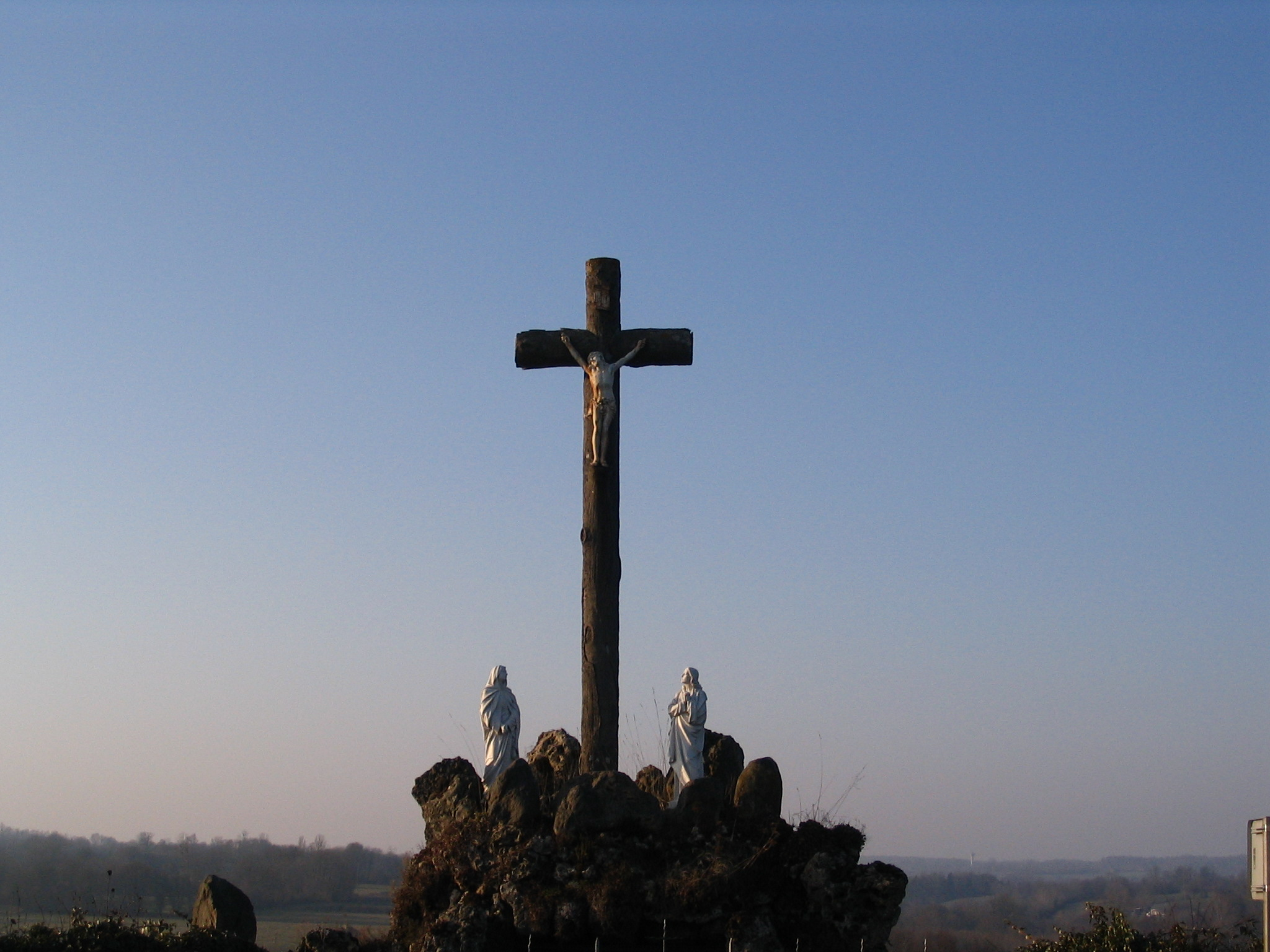 Calvaire de Sainte-Gauburge-Sainte-Colombe (Orne, France)